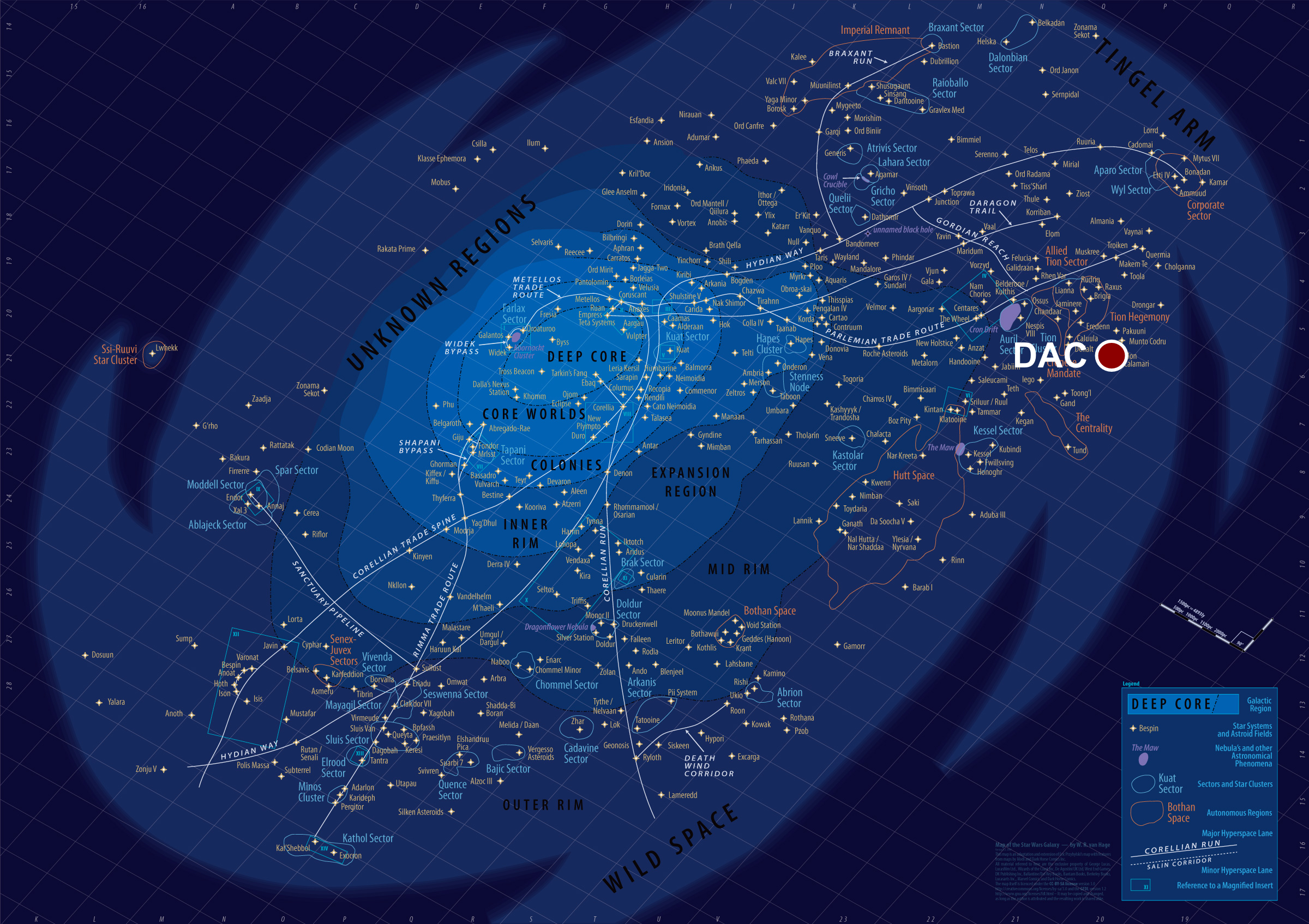 Localisation de Dac sur la carte Star Wars